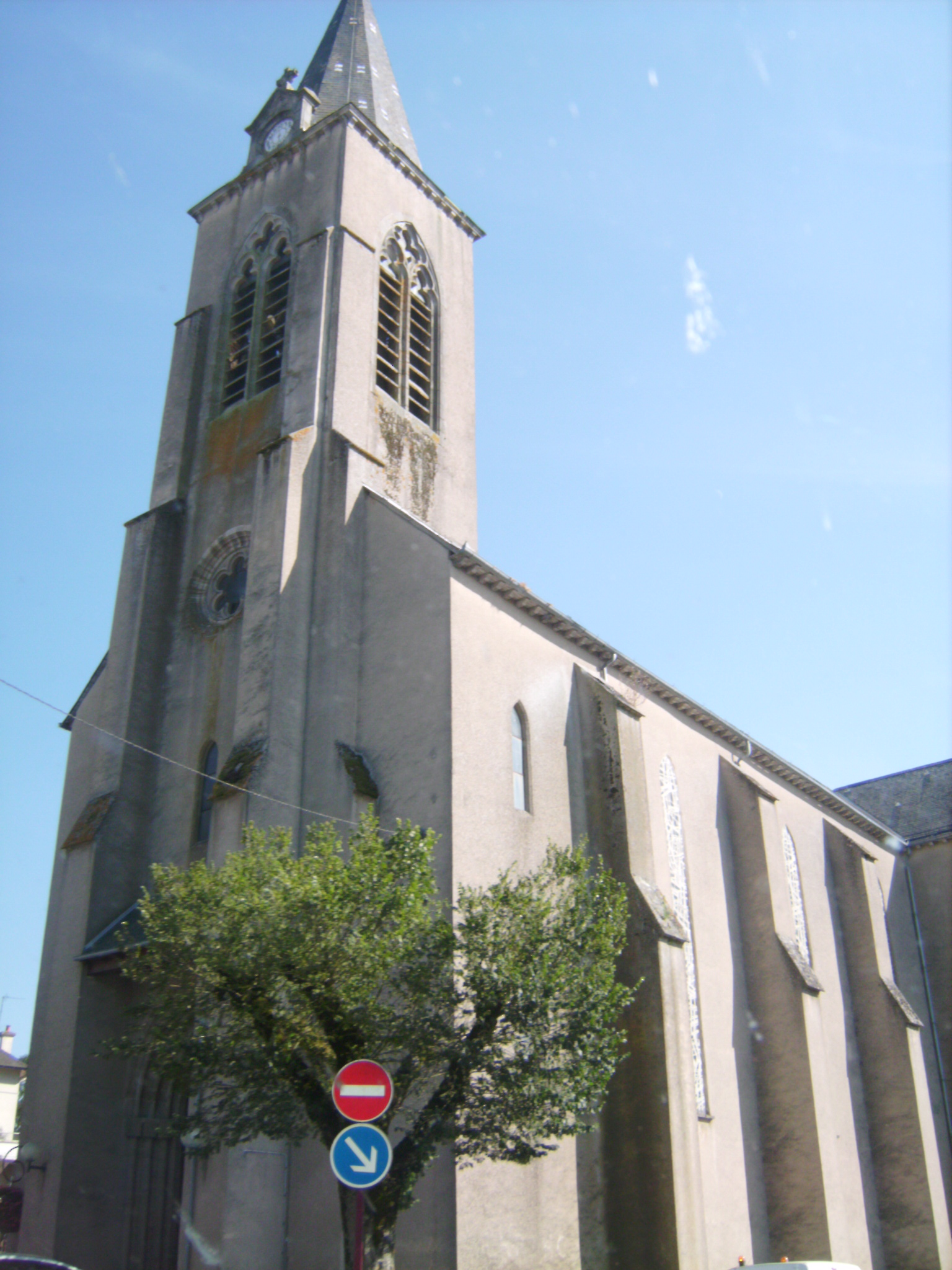 Photographie de l'Église de Réquista (Aveyron).